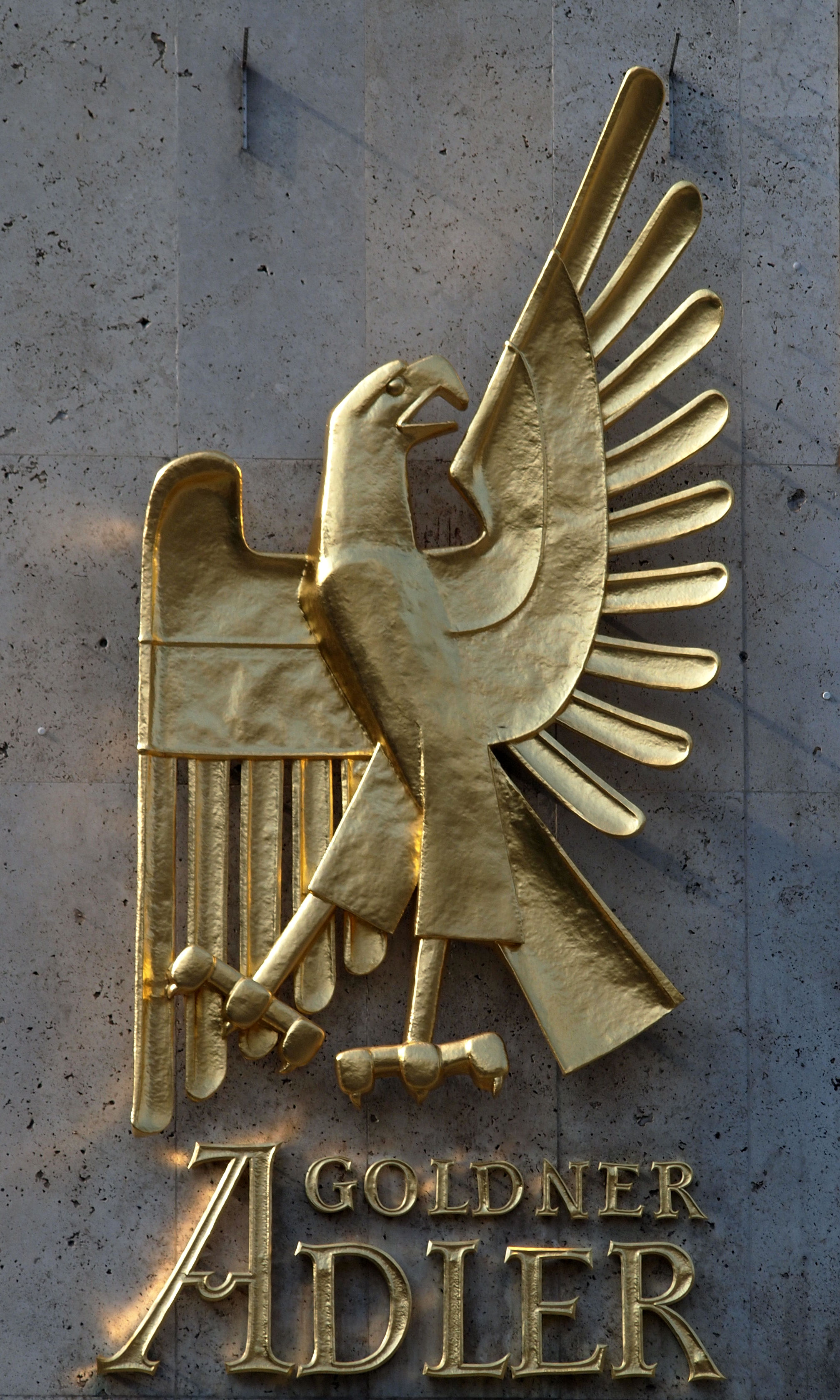 Relief am Restaurant Goldner Adler [1] in Pforzheim